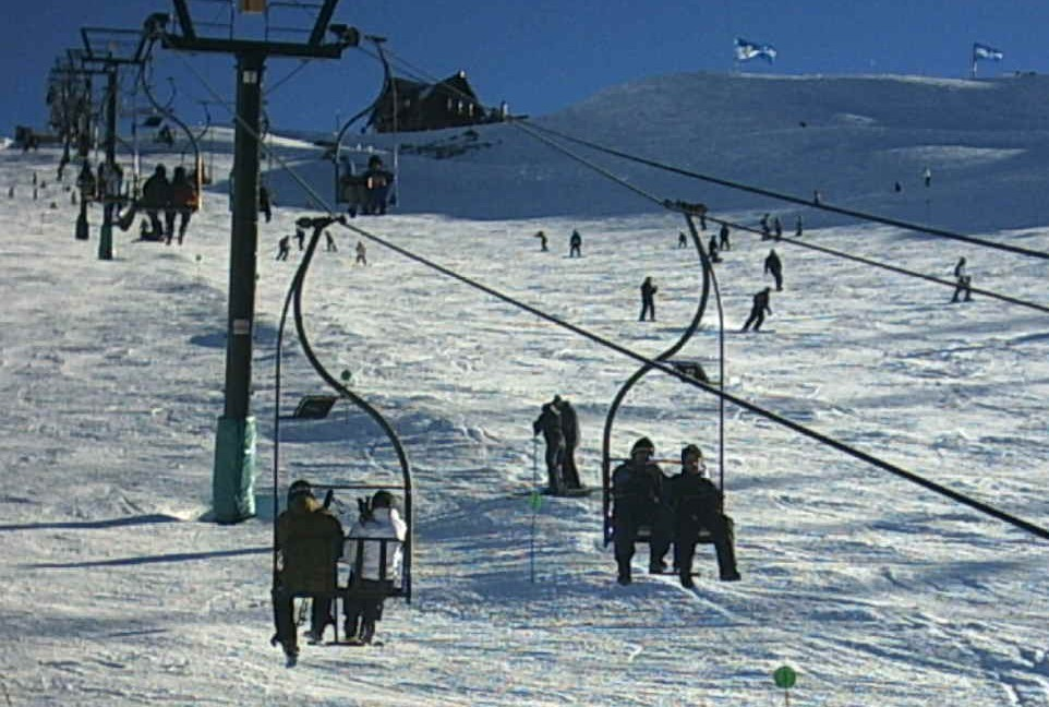 Bariloche (Argentina). Cerro Catedral. Esquí